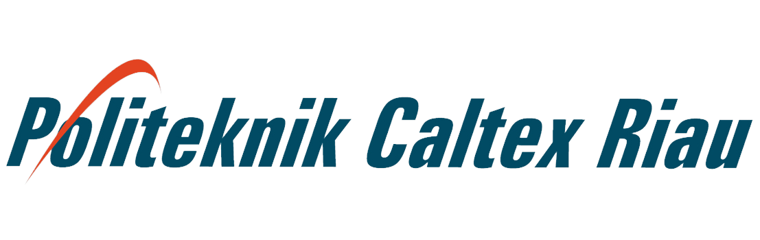 Logo Politeknik Caltex Riau